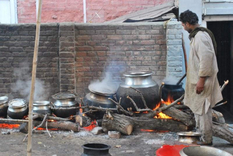 Woste Waza Preparing Wazwan